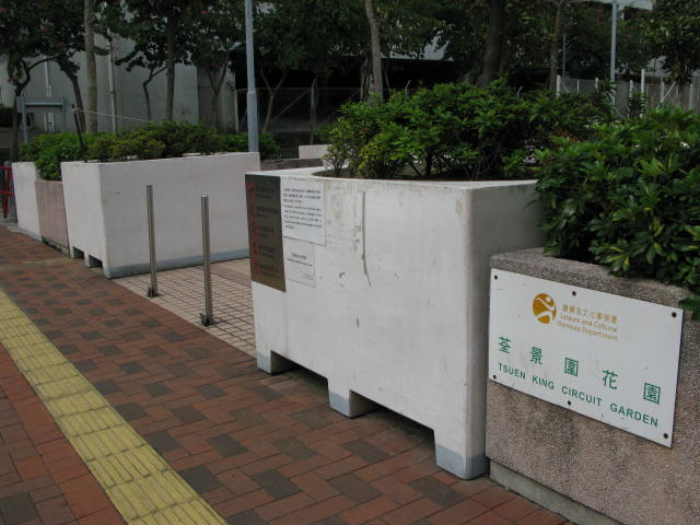 中文（香港）: 香港荃灣荃景圍花園